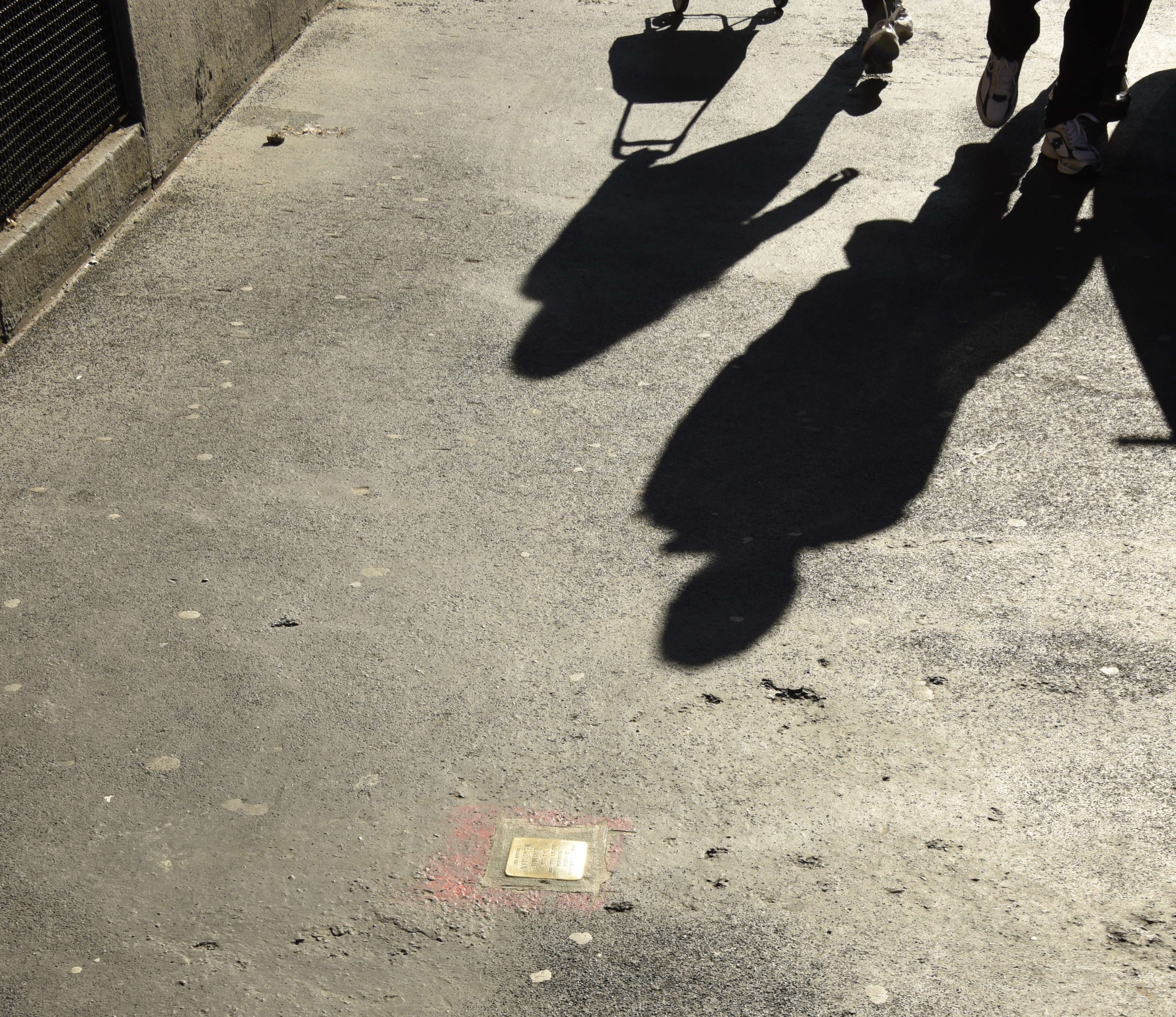 Stolperstein in Milano